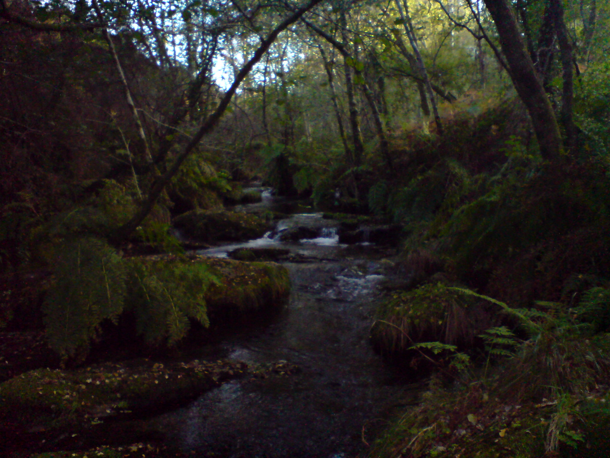 río de Lamela polo camiño dos muíños